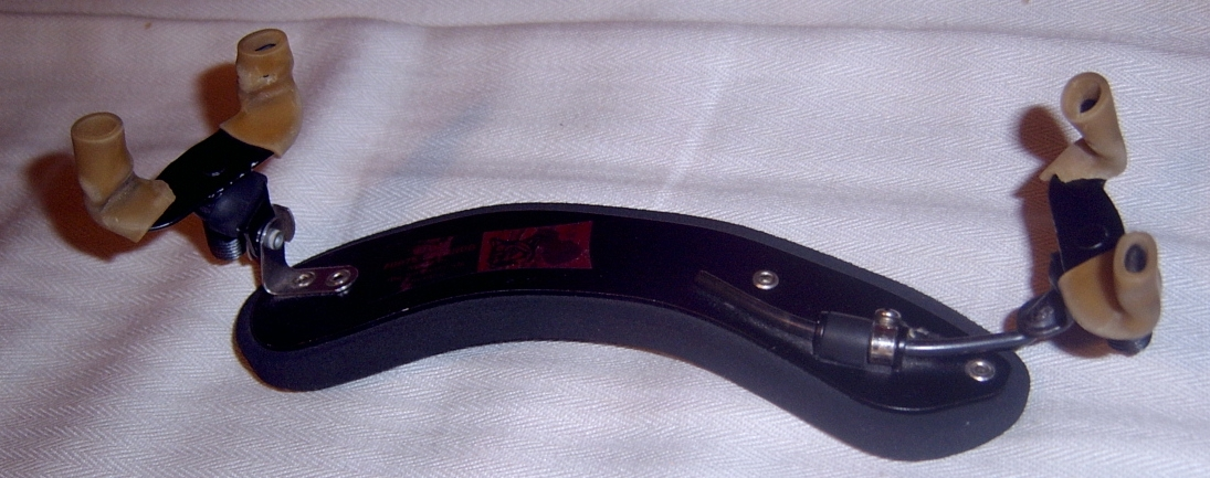 Coussin pour violon.